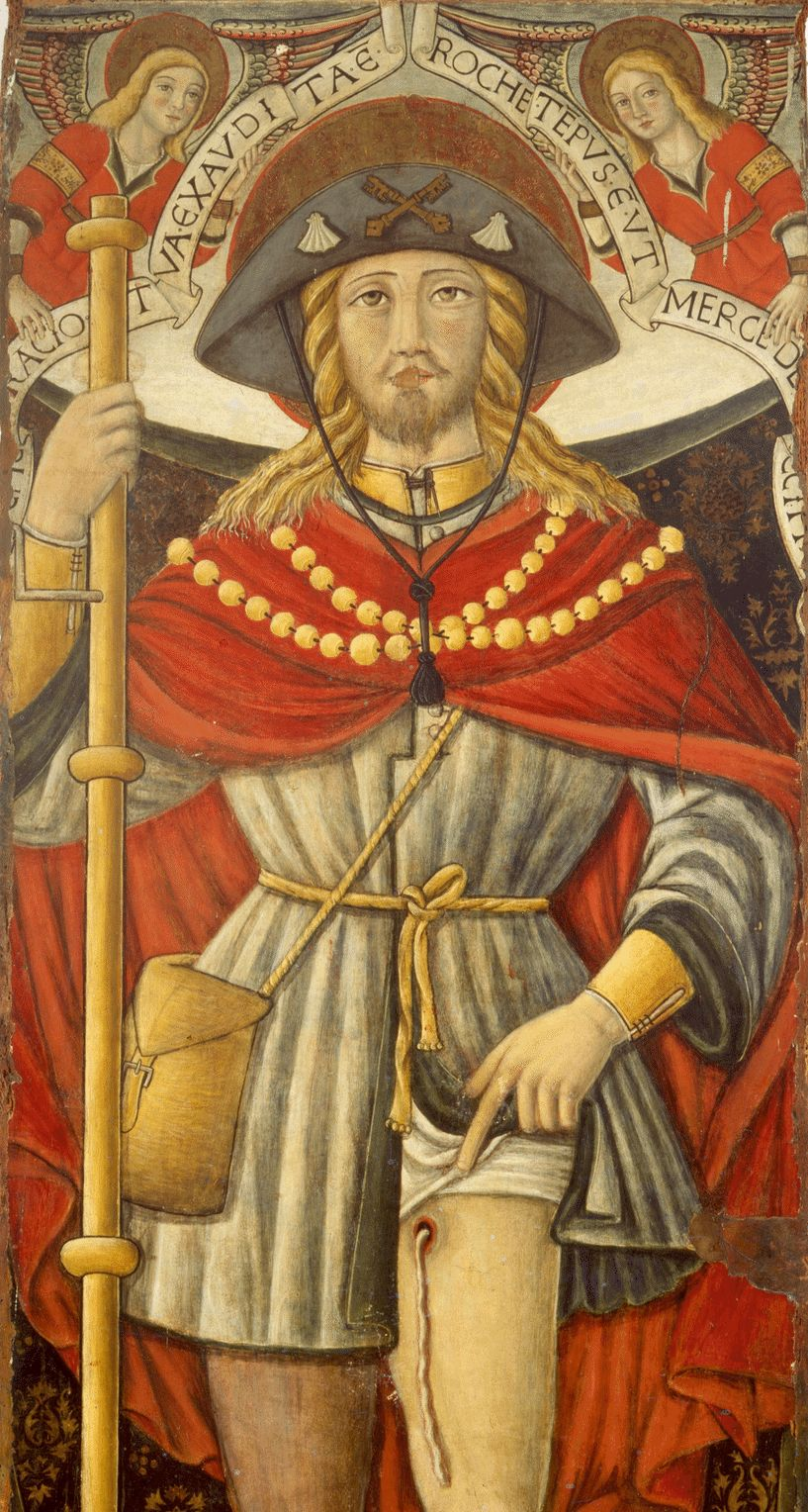 Szent Rókus és a Guinea-féreg (oltárkép részlete a milánói Pinacoteca di Brerában)